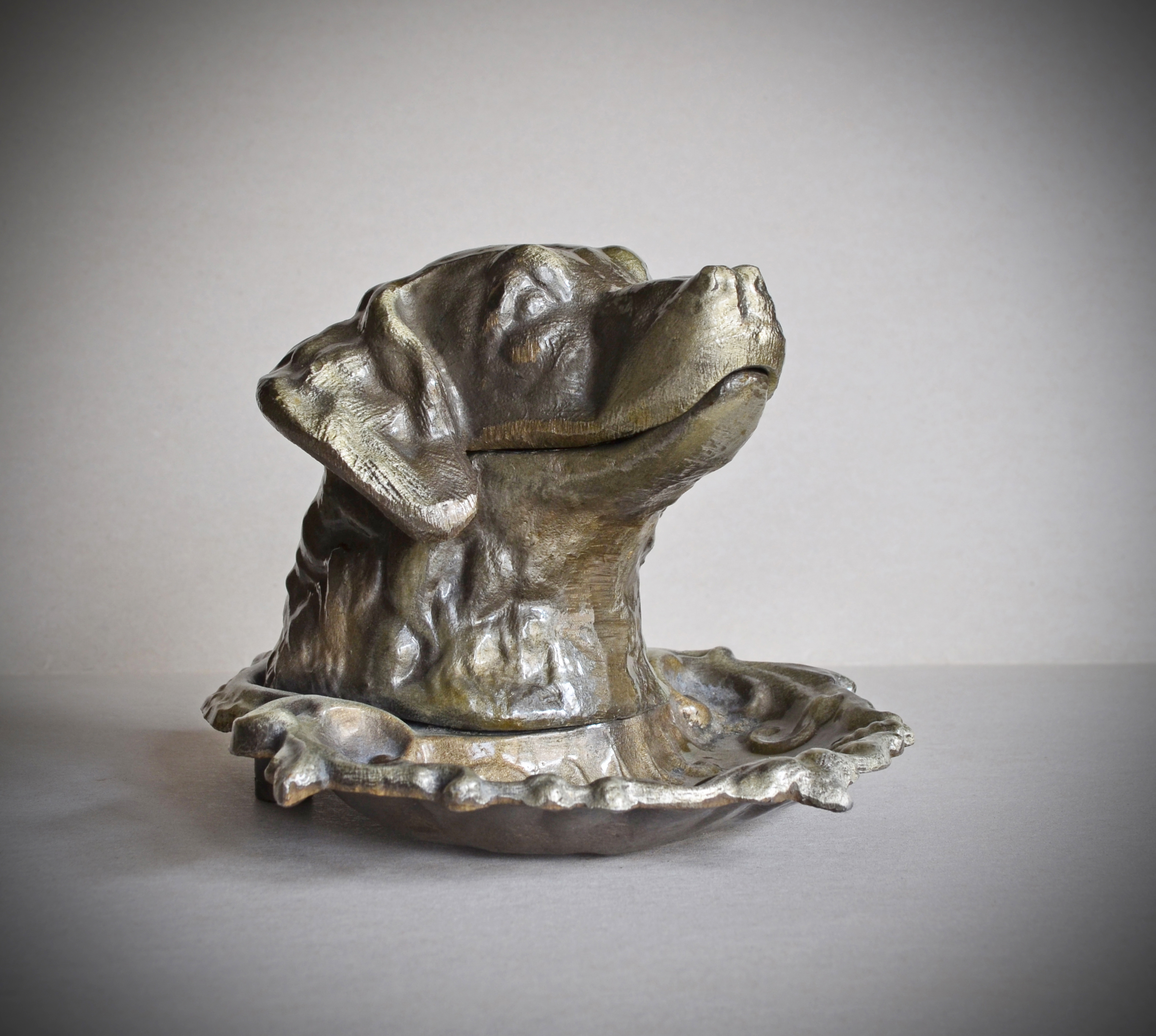 Пепельница "Собака" производства СССР.